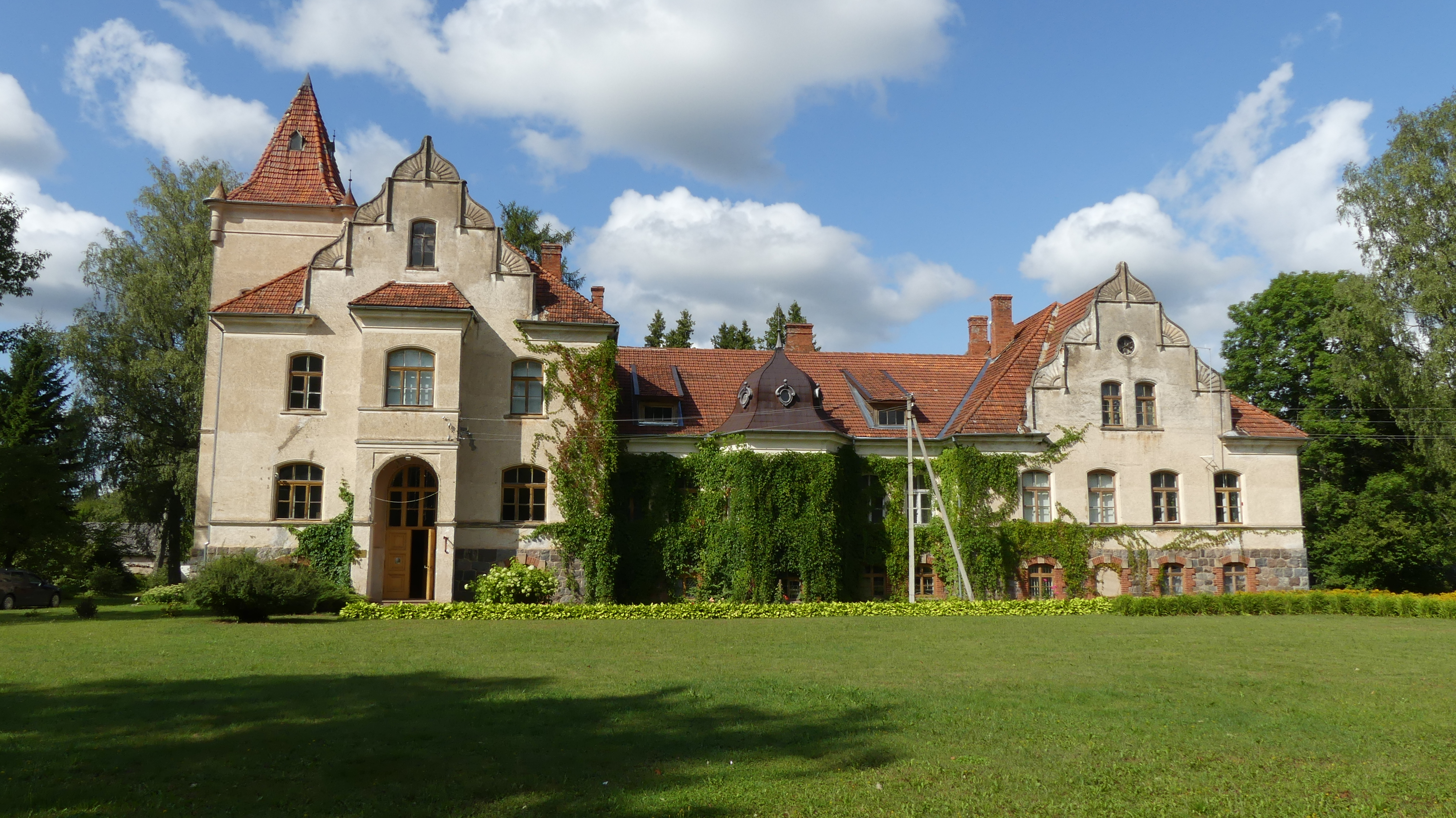 Mēri mõisa peahoone 2018. aastal